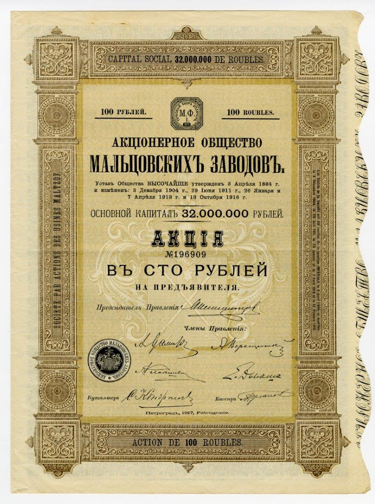 Акция в 100 руб. на предъявителя Акционерного общества Мальцовских заводов с основным капиталом в 32 млн. руб. Петроград, 1917 г.